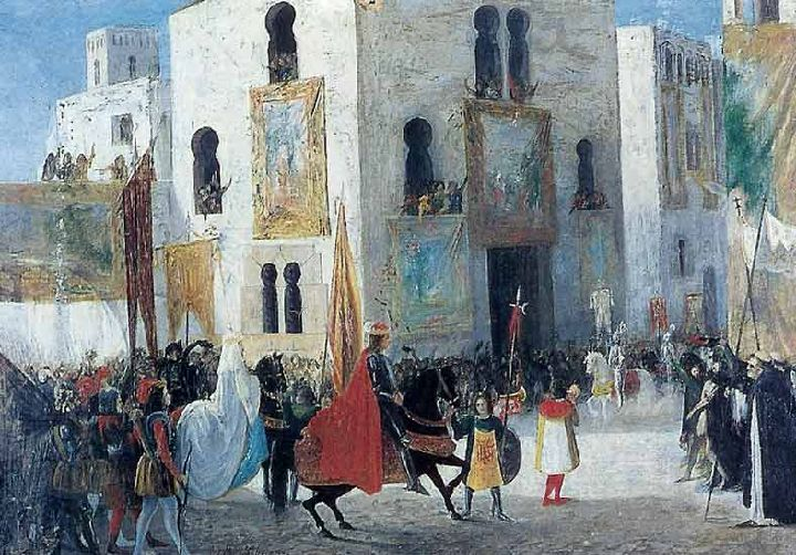 Foto del cuadro que pintara José María Sobejano en 1876 sobre la entrada de los Reyes Católicos en Murcia durante su visita a la ciudad en 1488.